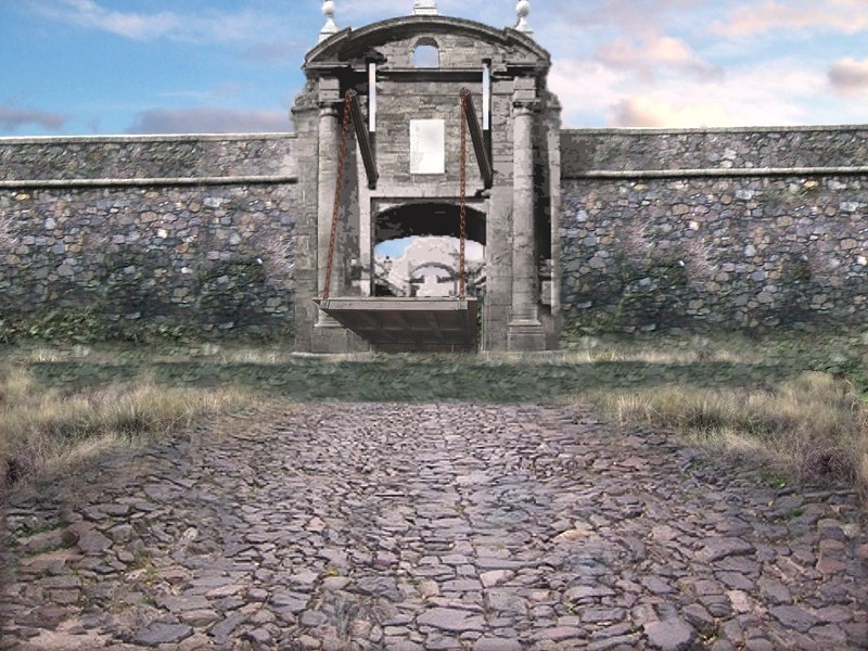 Recreación digital de época colonial.